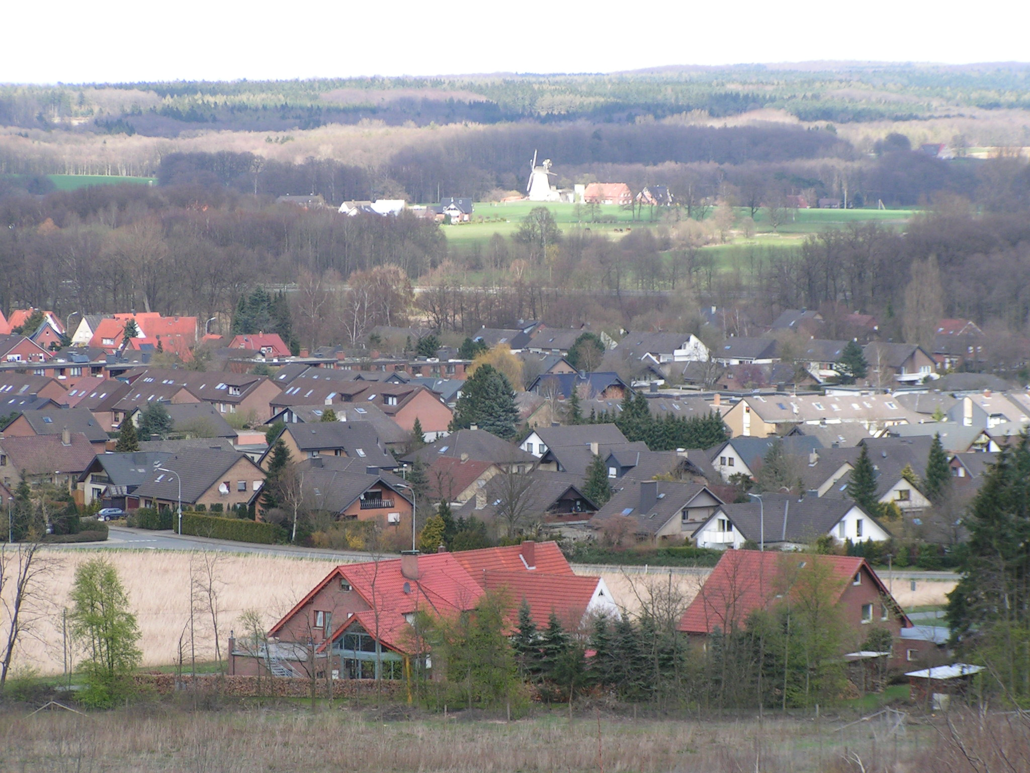 Blick über Lechtingen vom Piesberg aus